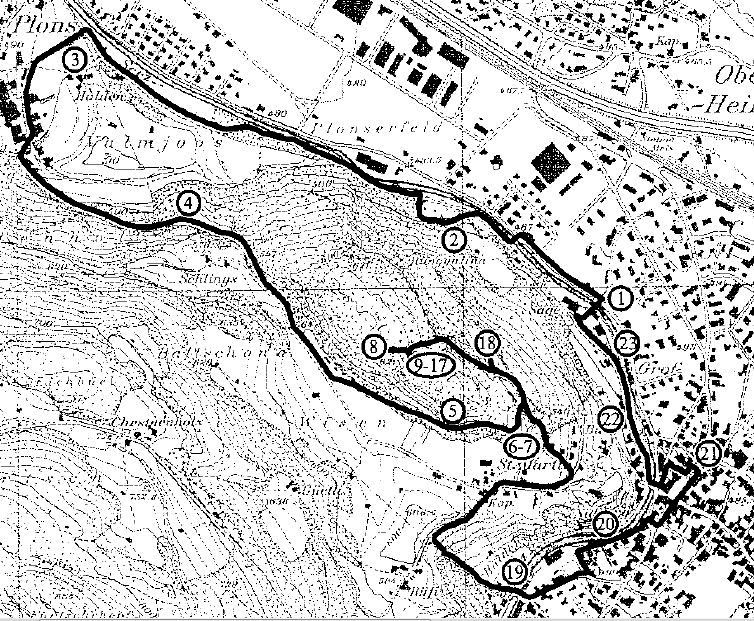 Geoweg Mels Übersichtstafel, Mels SG, Schweiz